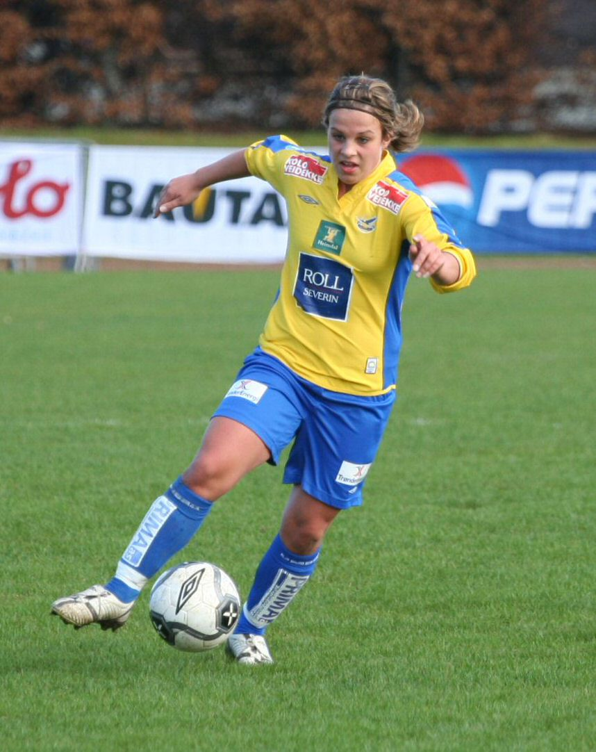 Fotballspilleren Marita Eide